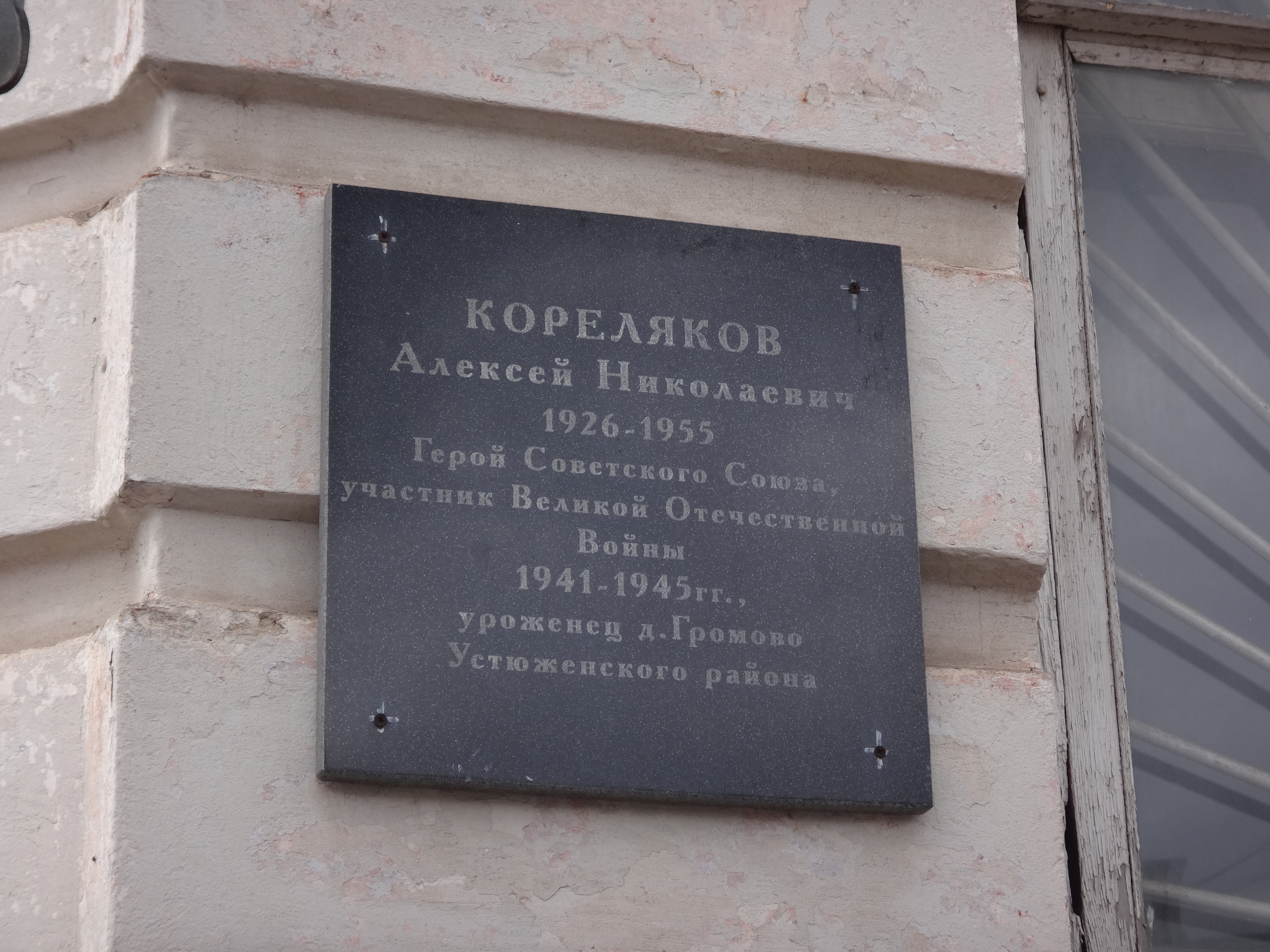 Кореляков, Алексей Николаевич